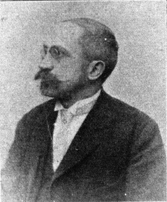 Österreichischer Politiker, Reichsratswahl 1907, Name siehe Dateiname